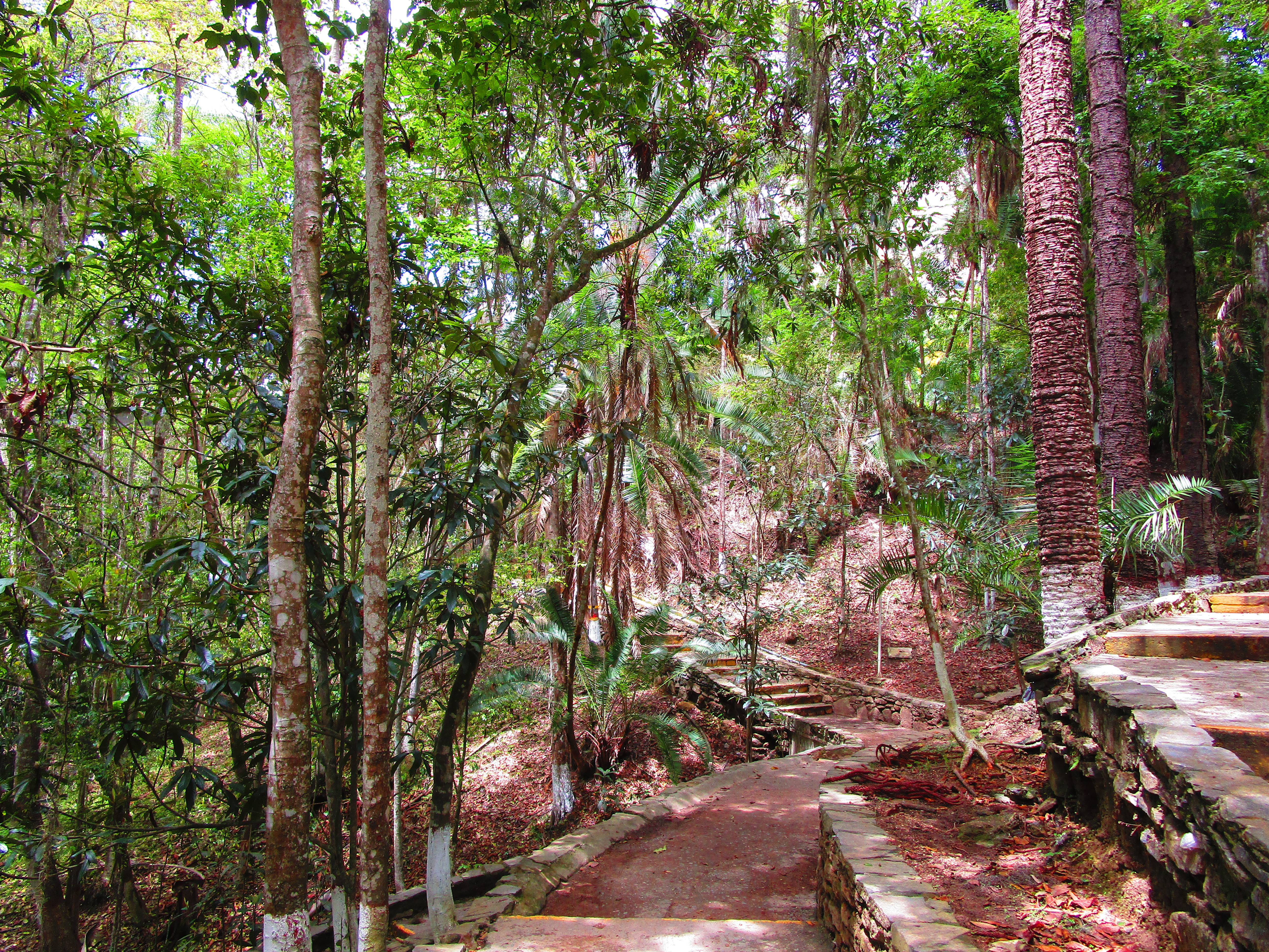 Parque Knoop, 2019